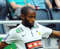 René Makondele